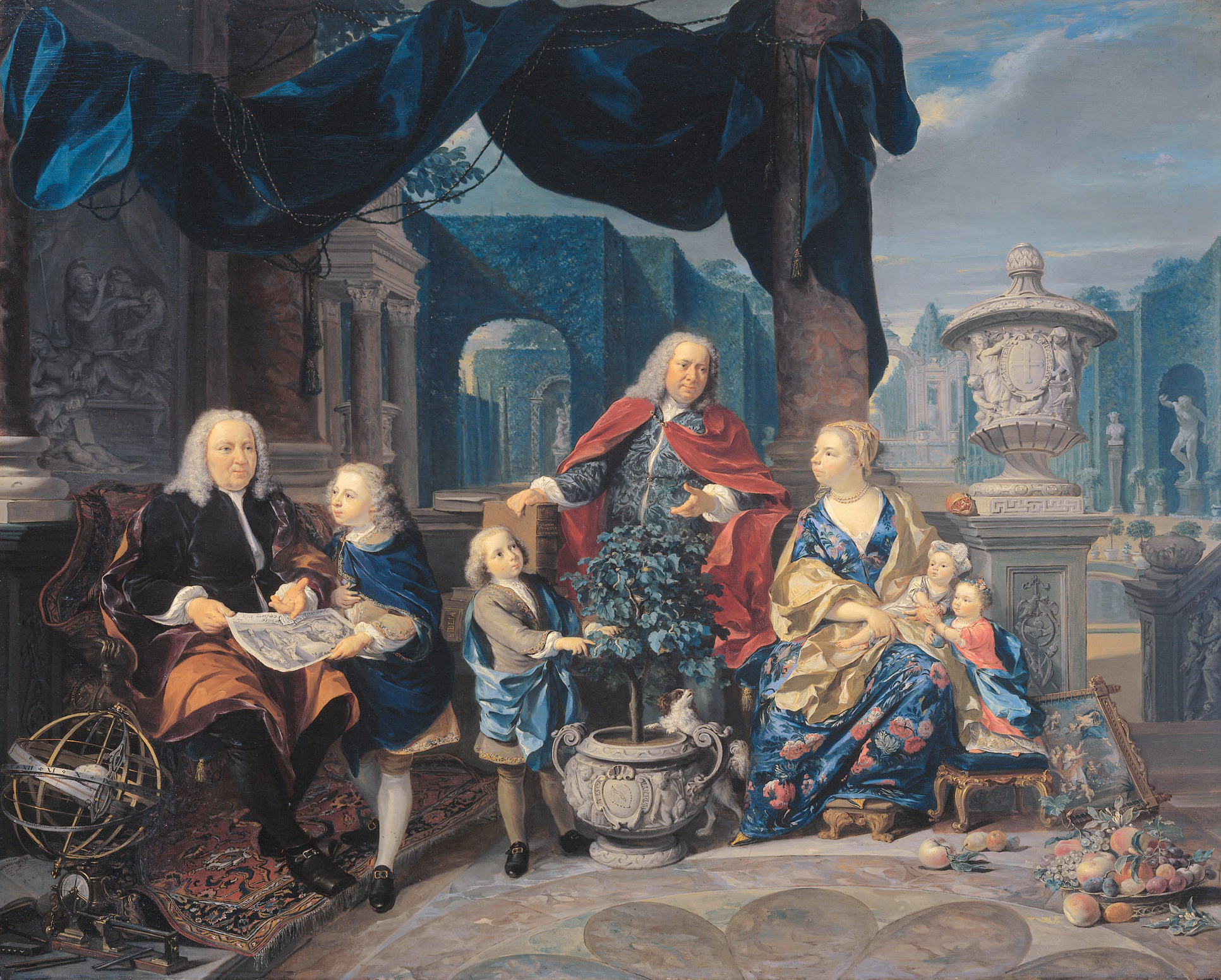 Sitters: Jacob Sijdervelt (born 1696) and his wife Maria van Oosterwijk (born 1711), David van Mollem (1670-1746), David van Mollem Sijdervelt (born 1727), Anthony (born 1731), Willem (born 1740) and Maria Suzanna Sijdervelt.